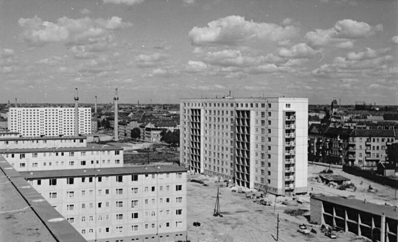 Berlin, Michelangelostraße, Wohnblocks Zentralbild Spremberg 24.8.1964 Zwei bezugsfertige Wohnblocks …werden zum 15. Jahrestag in der Michelangelostraße in Berlin - Weissnsee übergeben. Die Montagearbeiten begannen im Januar 1963. Jeder Block hat 120 Wohnungseinheiten. Die Wohnhäuser links sind bereits bezogen.